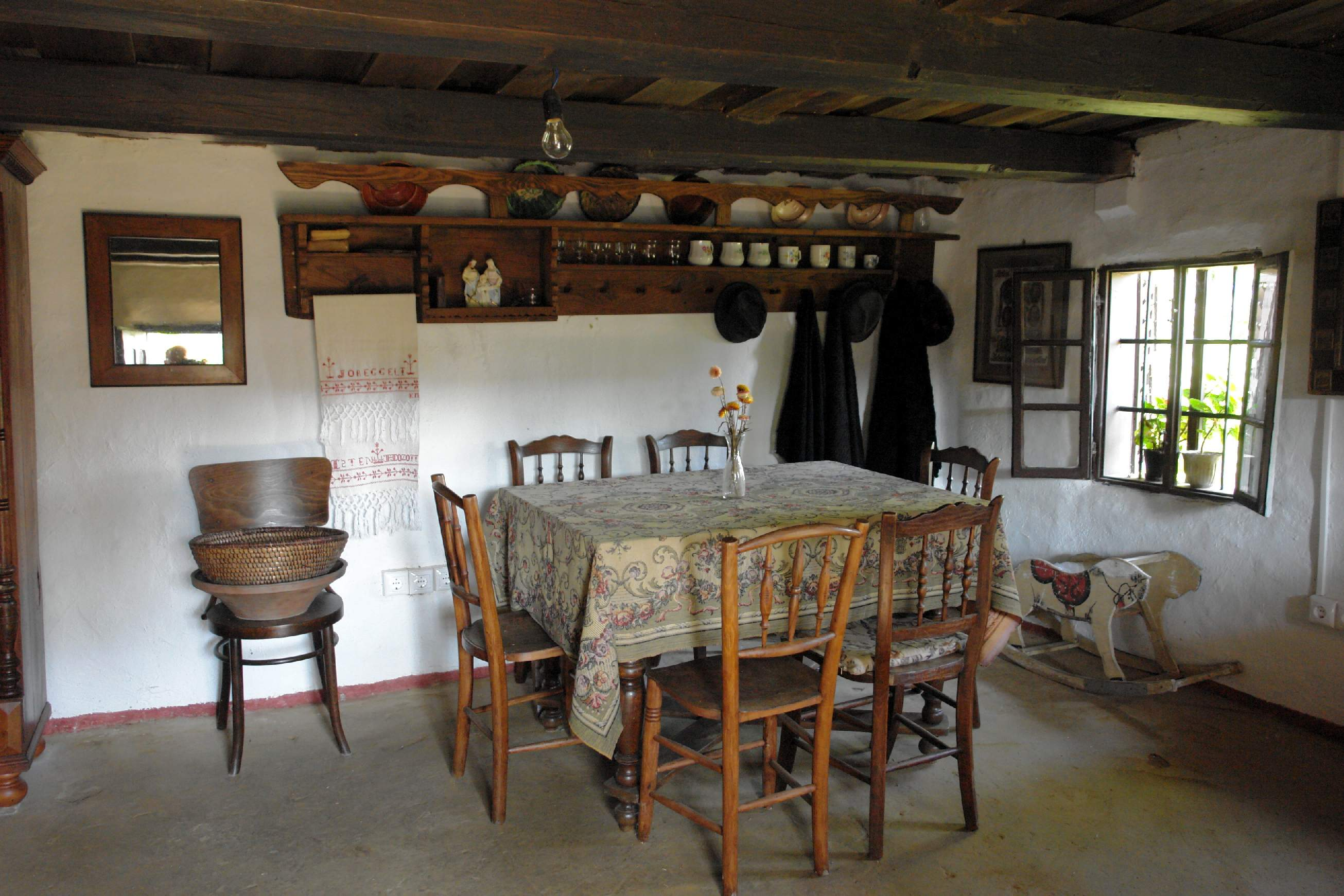 népi lakóház - Múzeumház This is a photo of a monument in Hungary. Identifier: 10846